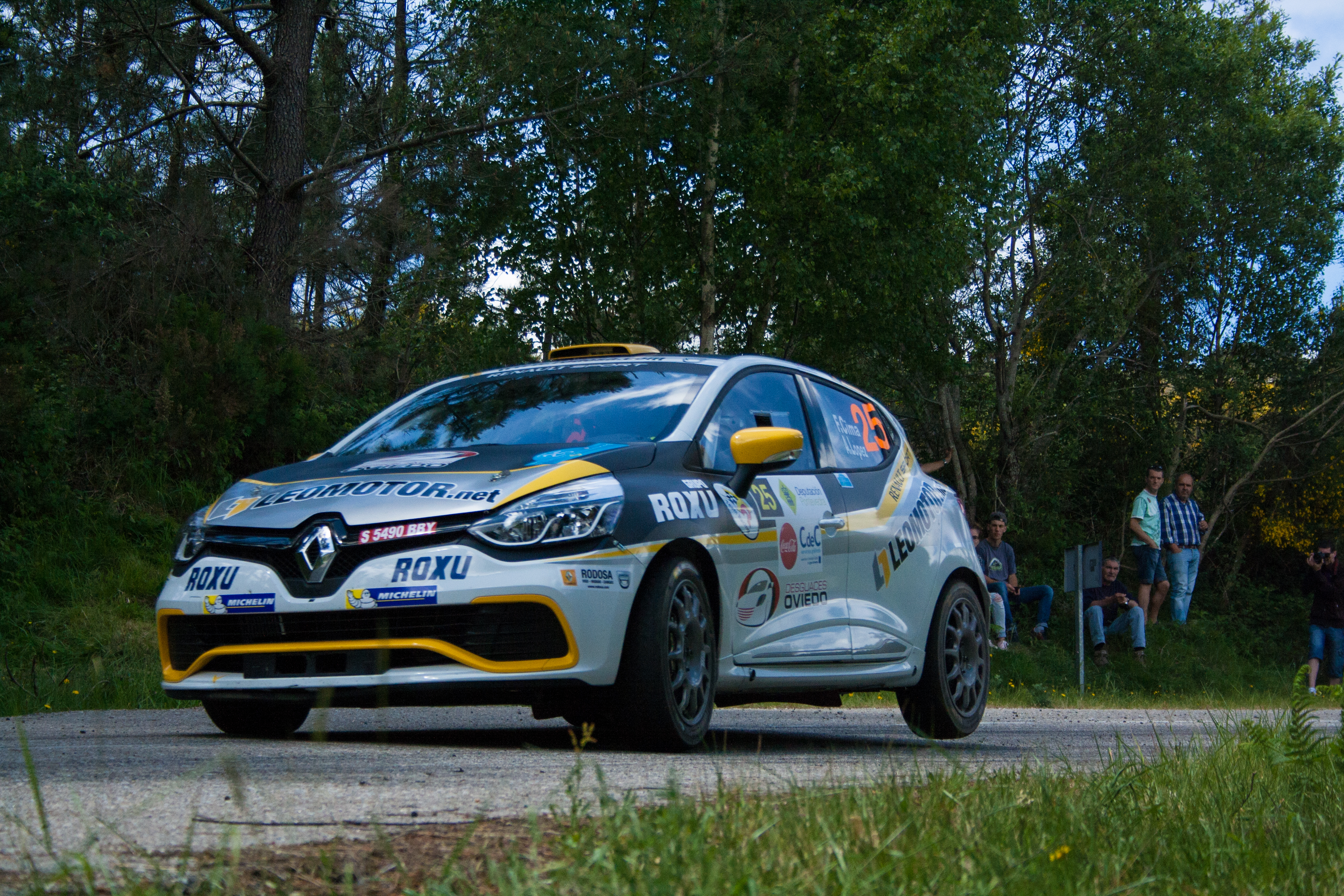 FRANCISCOCIMA ALEJANDRO LOPEZ